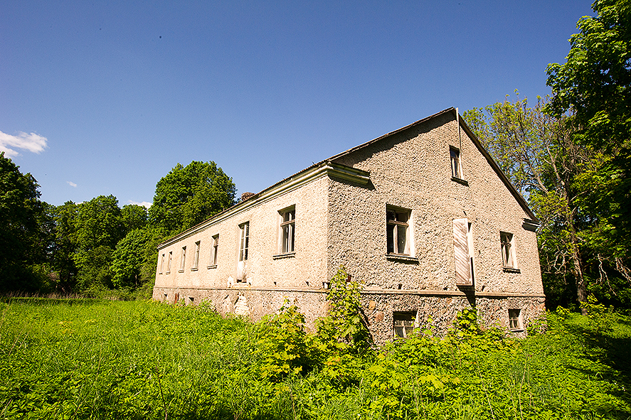 Ilzenbergo dvaro ansamblio statinys: Gyvenamasis namas. Prieš rekonstrukciją 2012 metais.